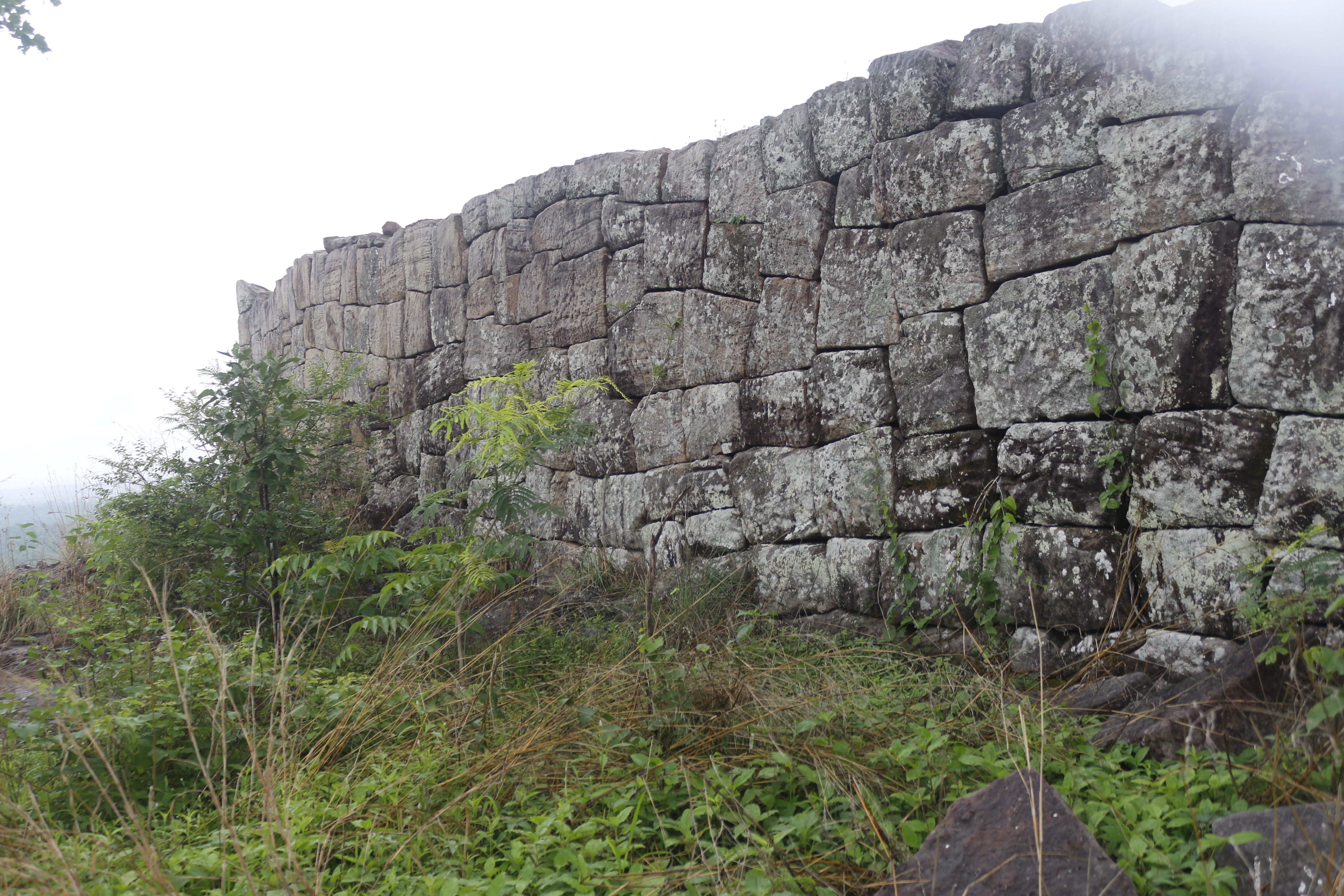 గొంతెమ్మ గుట్ట కోట గోడలు